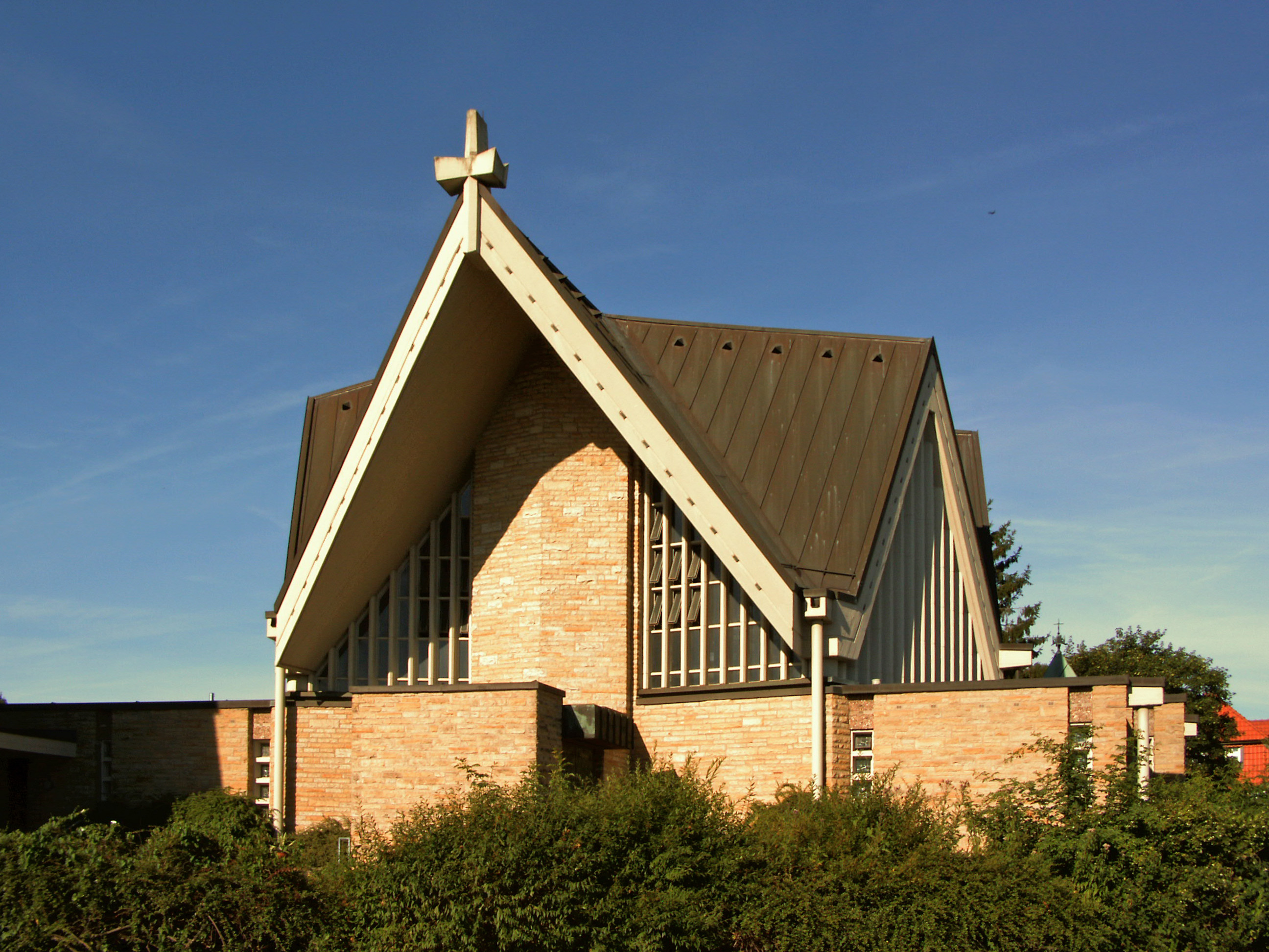 Katholische Kirche St. Maria Mutter der Kirche in Ahrbergen, Ortsteil von Giesen